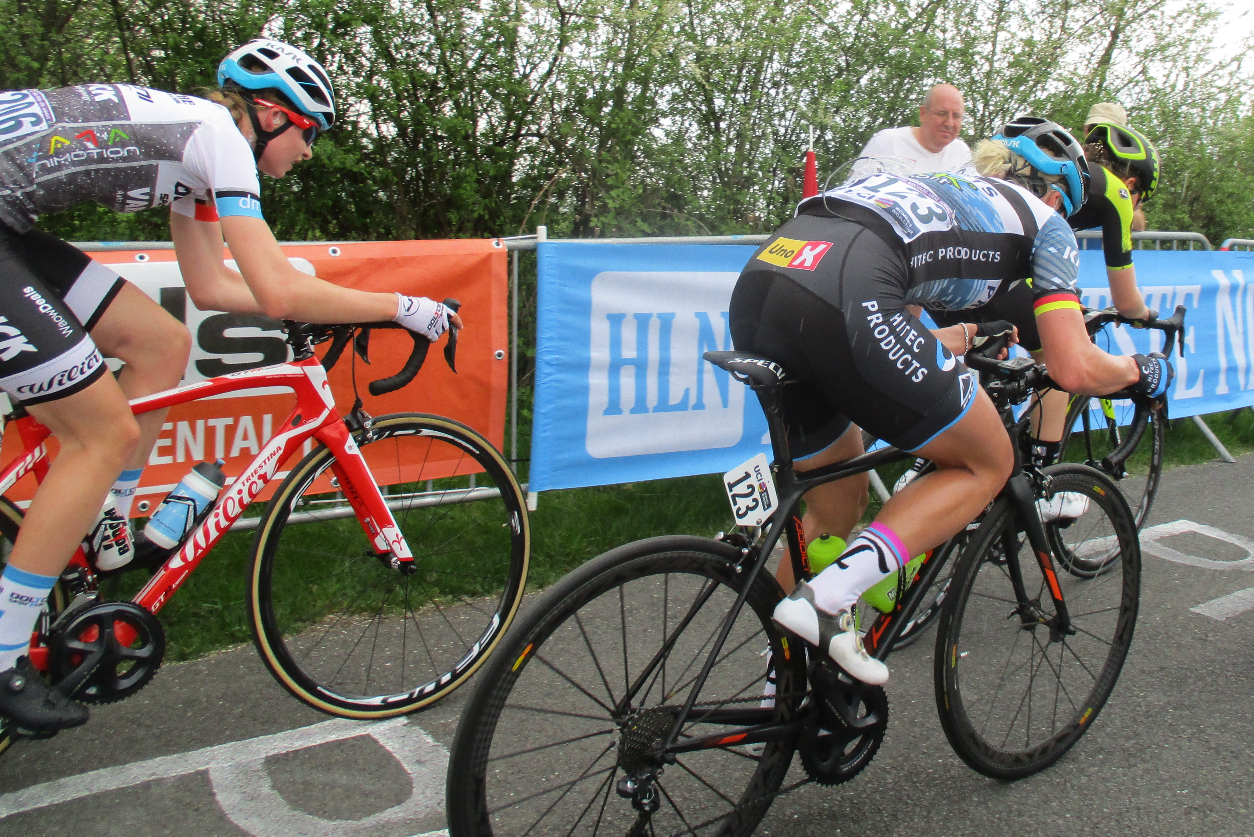 Beklimming van La Redoute tijdens Luik-Bastenaken-Luik 2018 voor vrouwen.